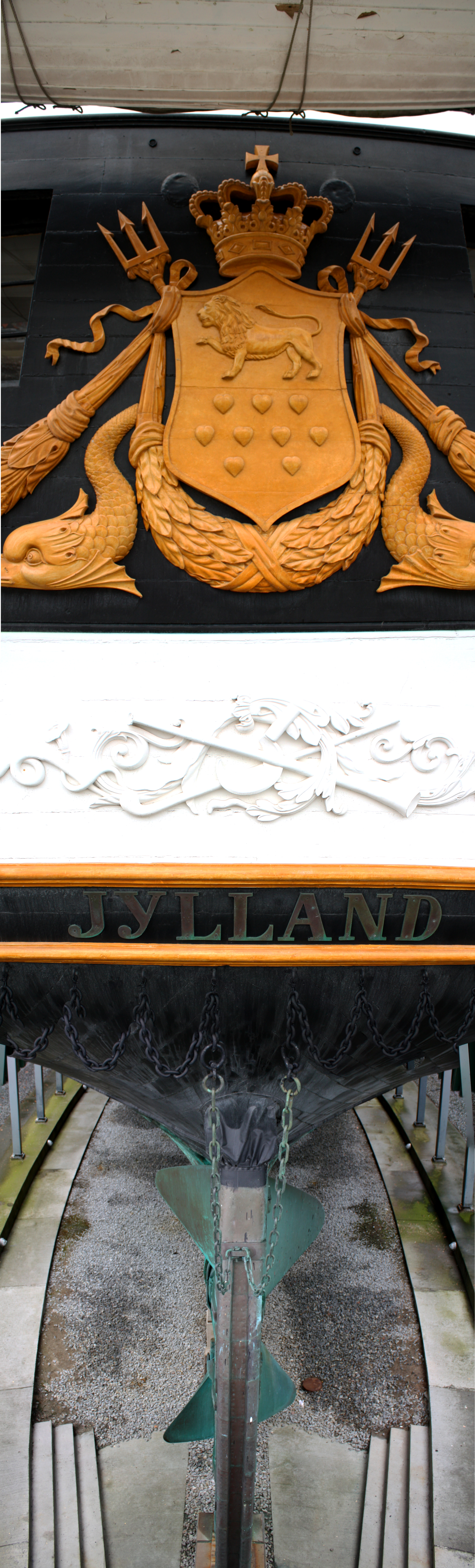 Heckpanorama der Fregatte Jylland von 1856, Ebeltoft (DK)